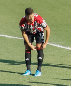 (Santos - SP, 16/11/2019) Partida de futebol Santos e São Paulo na Vila Belmiro. Foto: Isac Nóbrega/PR